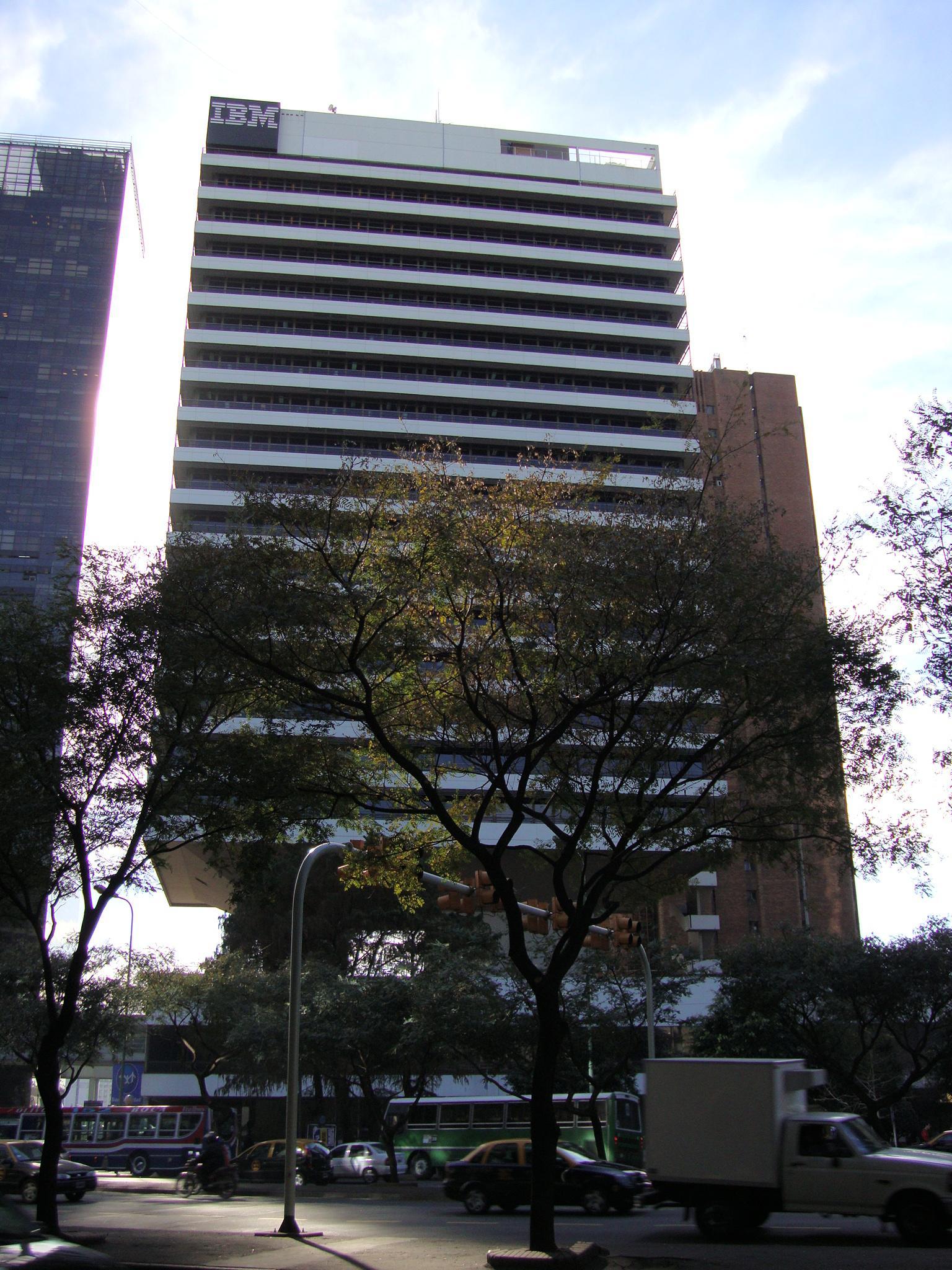 La Torre IBM (Mario R. Álvarez y Asoc., 1983) en Catalinas Norte, barrio de Retiro. Buenos Aires, Argentina.